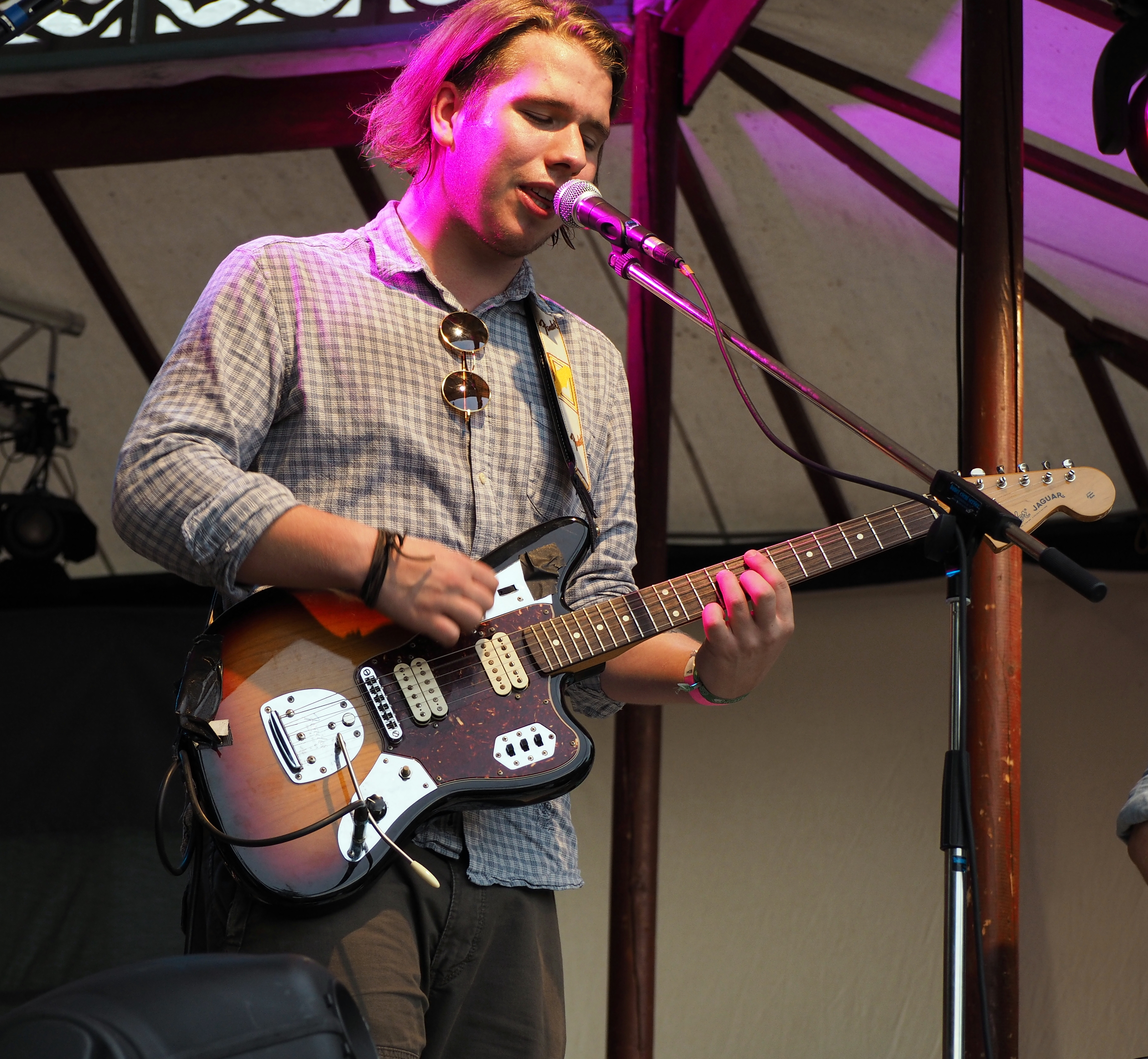 Sammersee Festival 2015 - Kandinsky. Ben Meyer mit einer Fender Jaguar Festivalsommer This photo was created with the support of donations to Wikimedia Deutschland in the context of the CPB project "Festival Summer". This file is made available under the Creative Commons CC0 1.0 Universal Public Domain Dedication. The person who associated a work with this deed has dedicated the work to the public domain by waiving all of their rights to the work worldwide under copyright law, including all related and neighboring rights, to the extent allowed by law. You can copy, modify, distribute and perform the work, even for commercial purposes, all without asking permission. Thomas Springer Personality rights warningAlthough this work is freely licensed or in the public domain, the person(s) shown may have rights that legally restrict certain re-uses unless those depicted consent to such uses. In these cases, a model release or other evidence of consent could protect you from infringement claims.